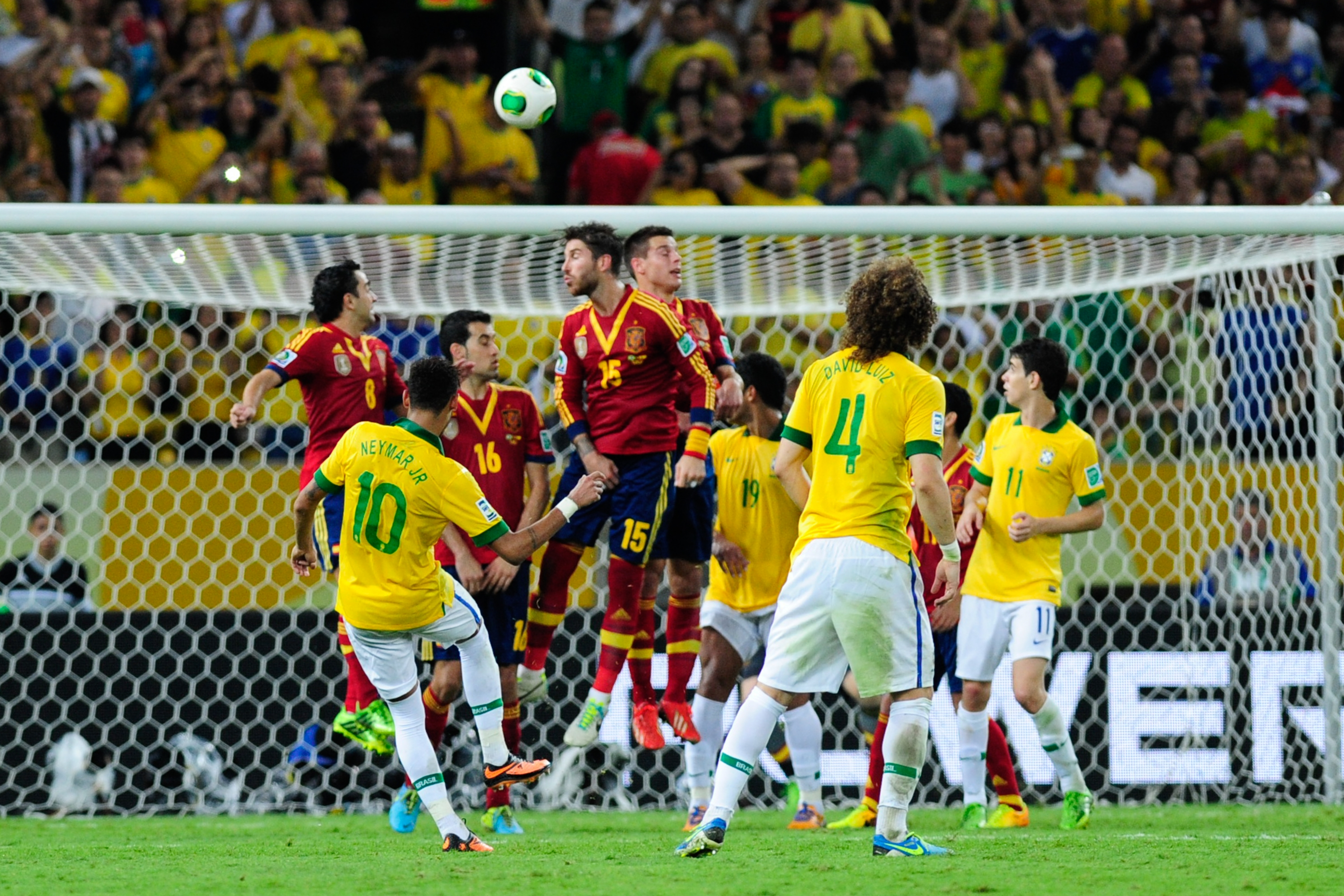 No Estádio do Maracanã, Brasil e Espanha disputam a taça da Copa das Confederações de 2013.